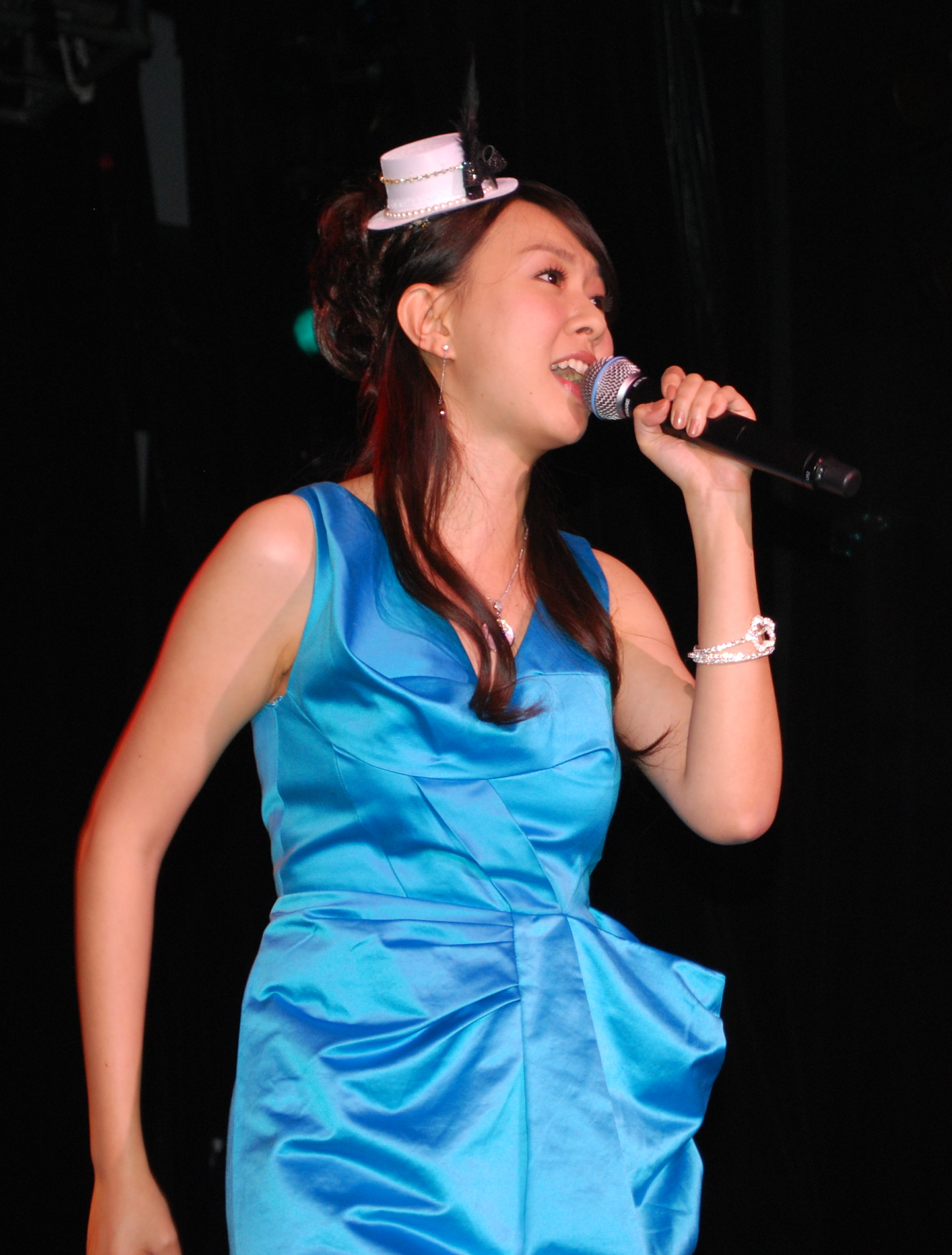 卓依婷2009年美國演唱會。